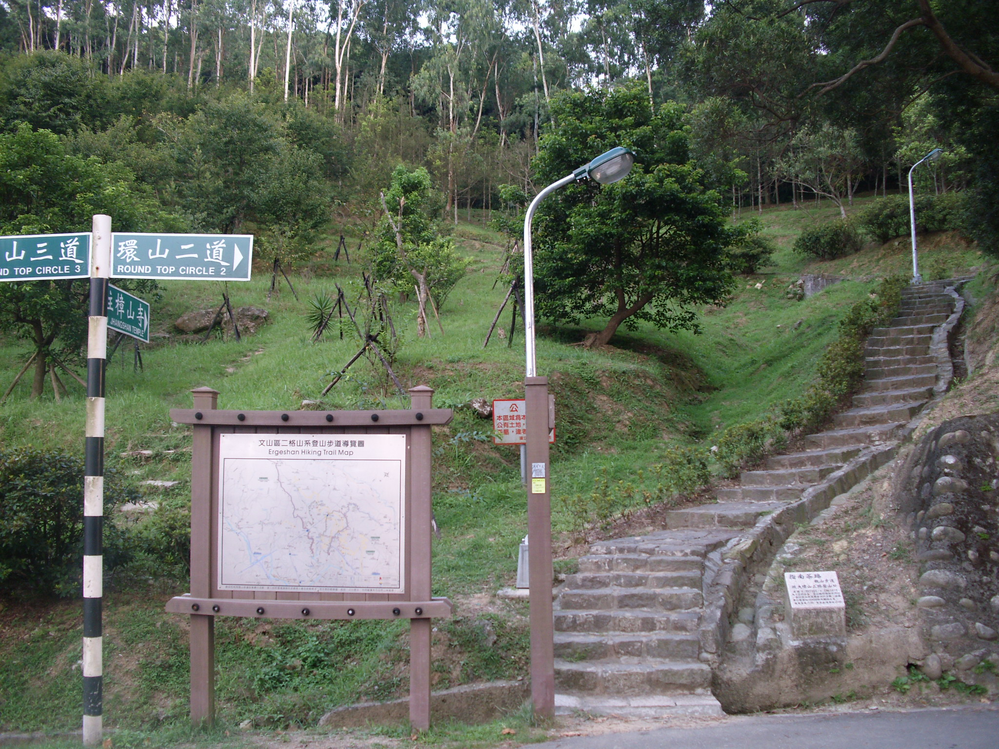 Bân-lâm-gú: 樟山寺步道入口，迵去樟山寺。